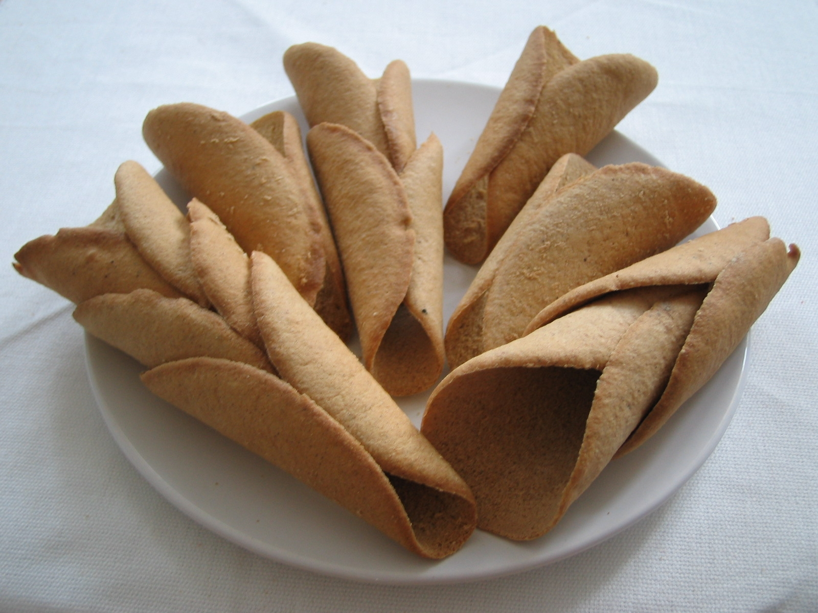 Štramberské uši na talíři. Vlastní fotka.